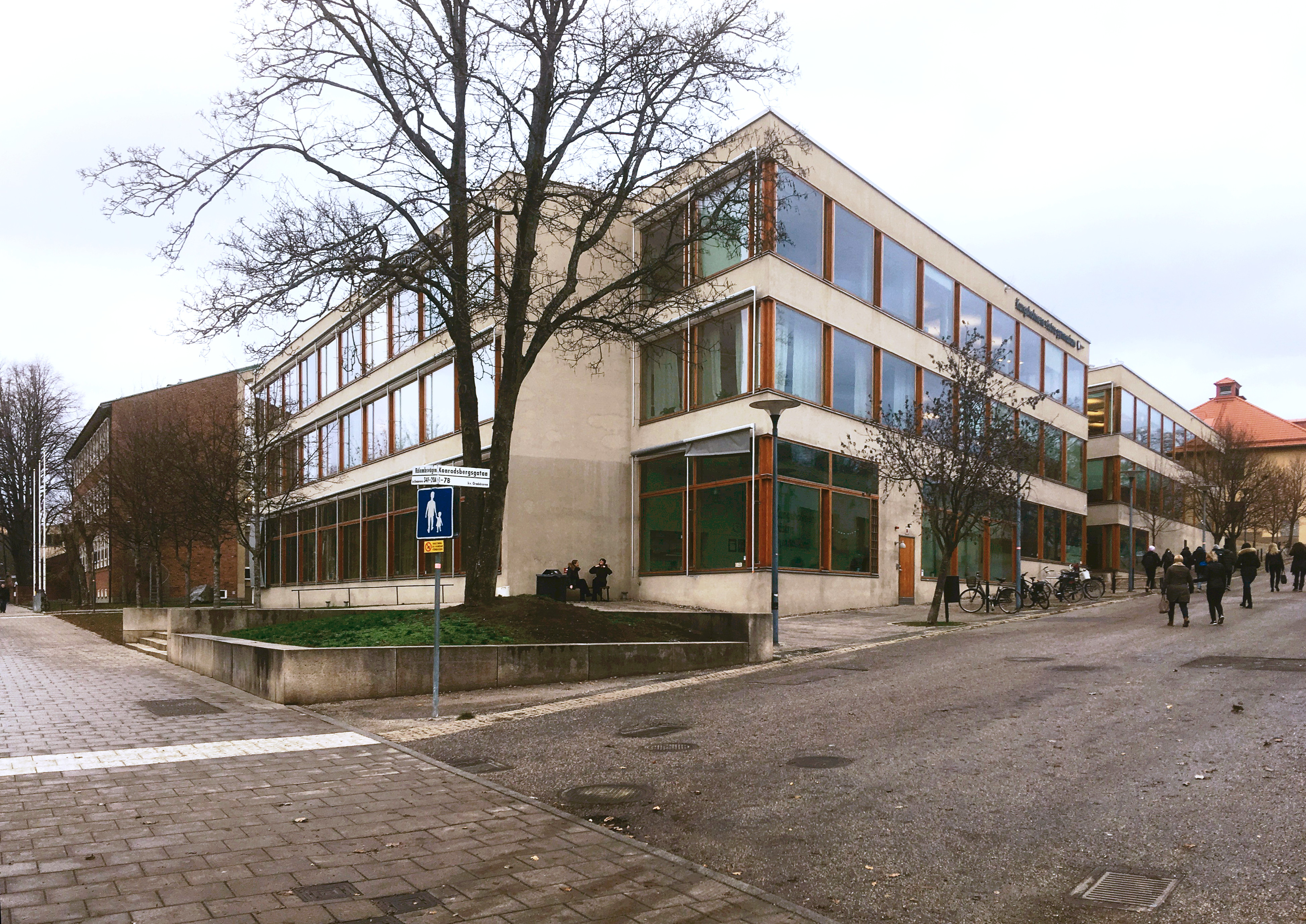 Kungsholmens västra gymnasium på Campus Konradsberg, Hus O, arkitekt Johan Celsing arkitektkontor (1999)